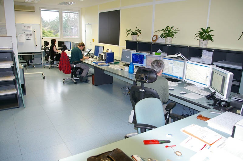 Český hydrometeorologický ústav, pracoviště předpovědní a výstražné služby